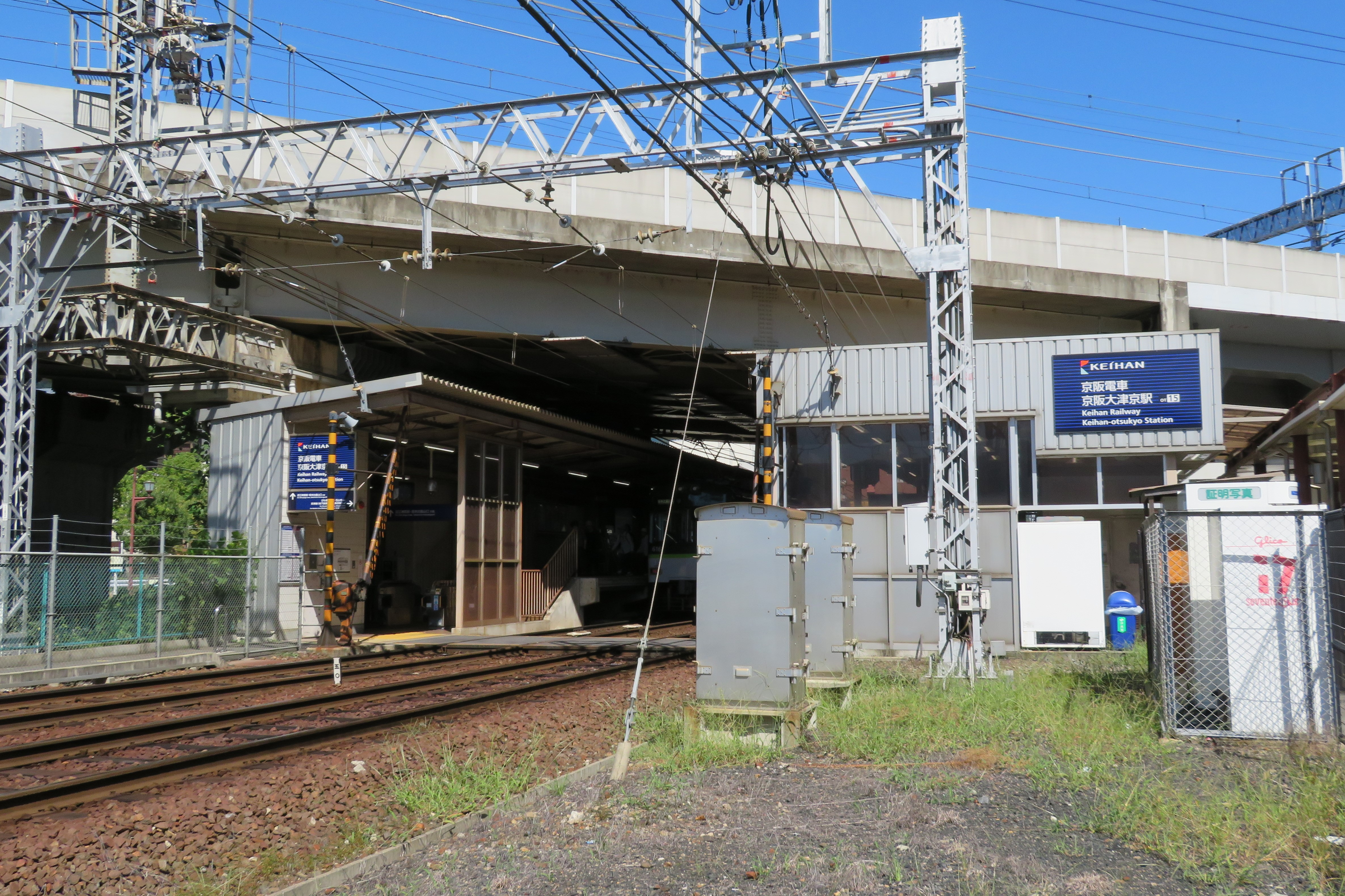 京阪大津京駅